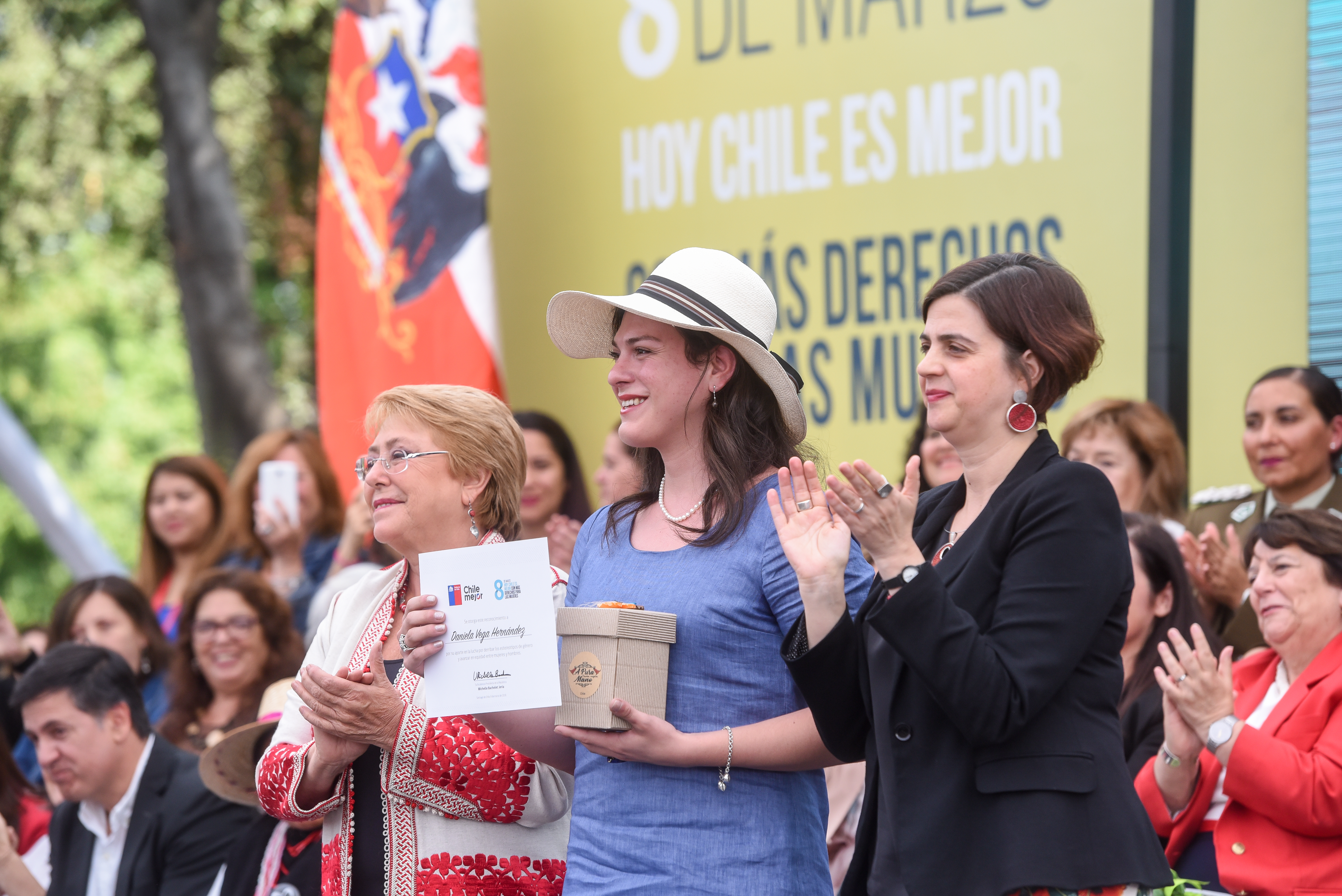 Conmemoración del Gobierno de Chile del Día Internacional de la Mujer en Lo Prado.